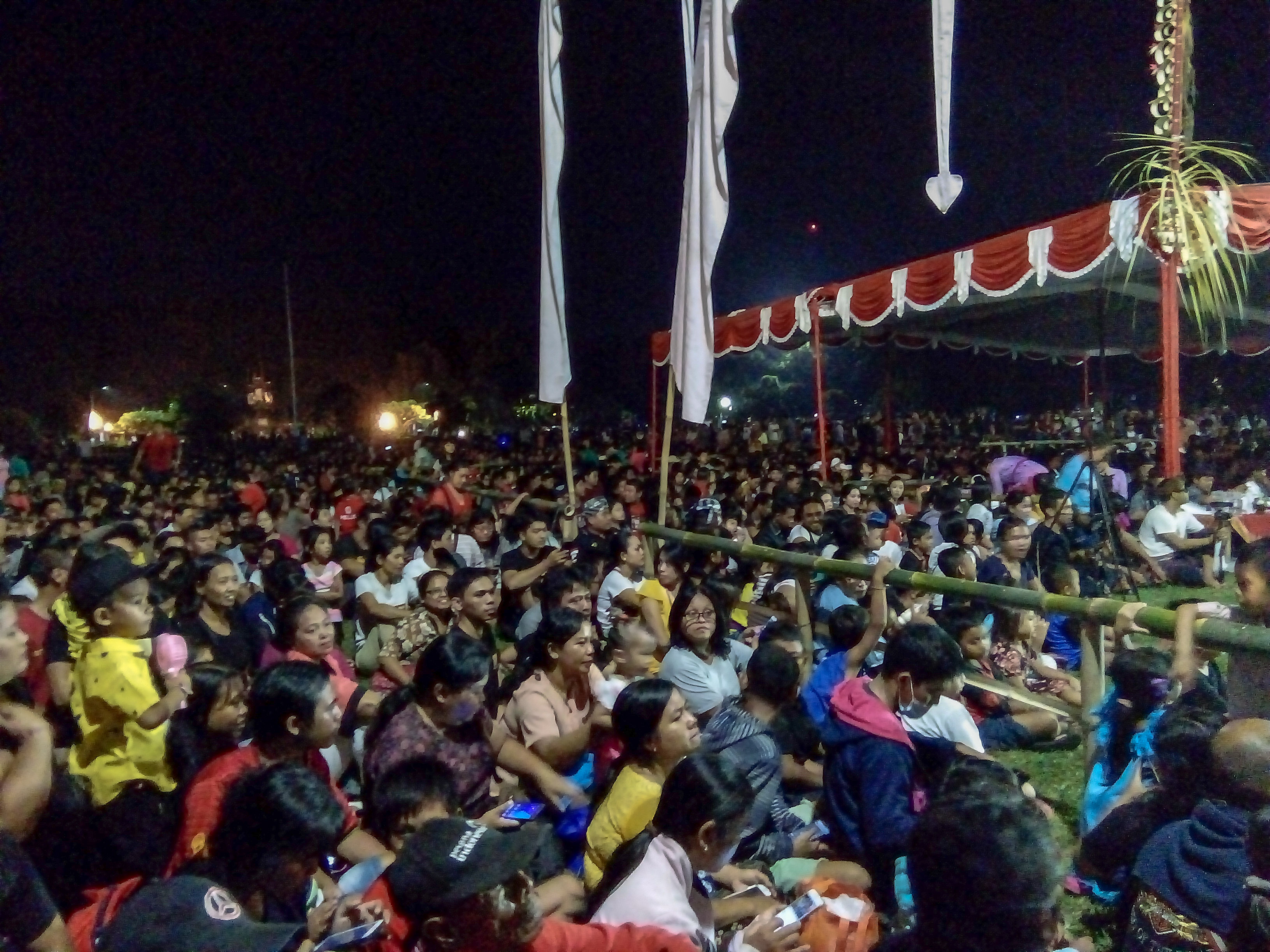 Ribuan penonton memadati Parade Baleganjur di Denpasar, 13 April 2019